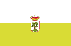 Bandera de La Parra